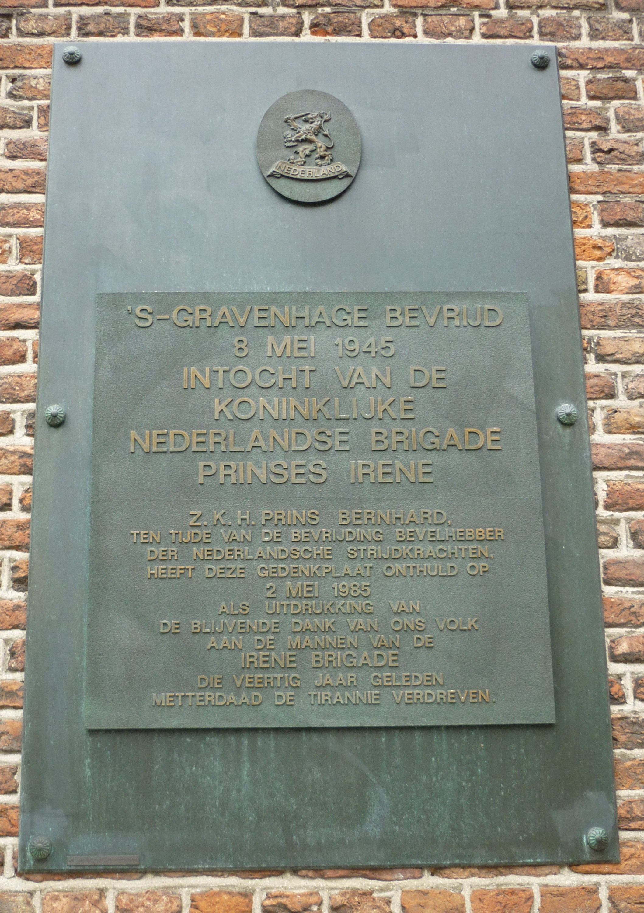 Plaquette over de bevrijding van Den Haag door de Prinses Irene Brigade